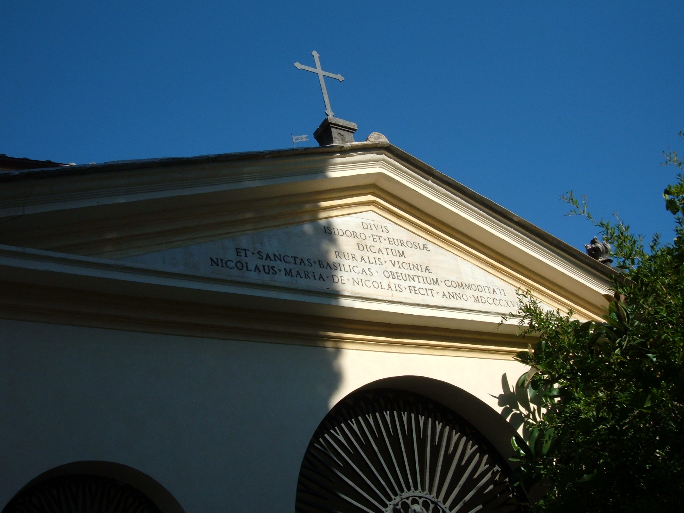 La chiesa dei Santi Isidoro ed Eurosia nel quartiere Ostiense a Roma.